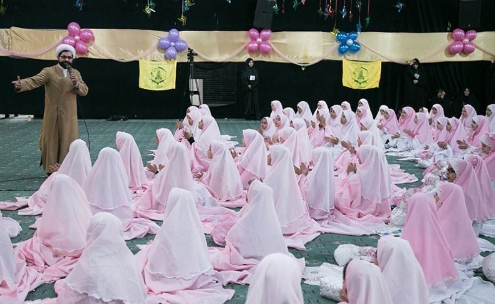 تصویری از کودکان و زنان با حجاب و یک آخوند